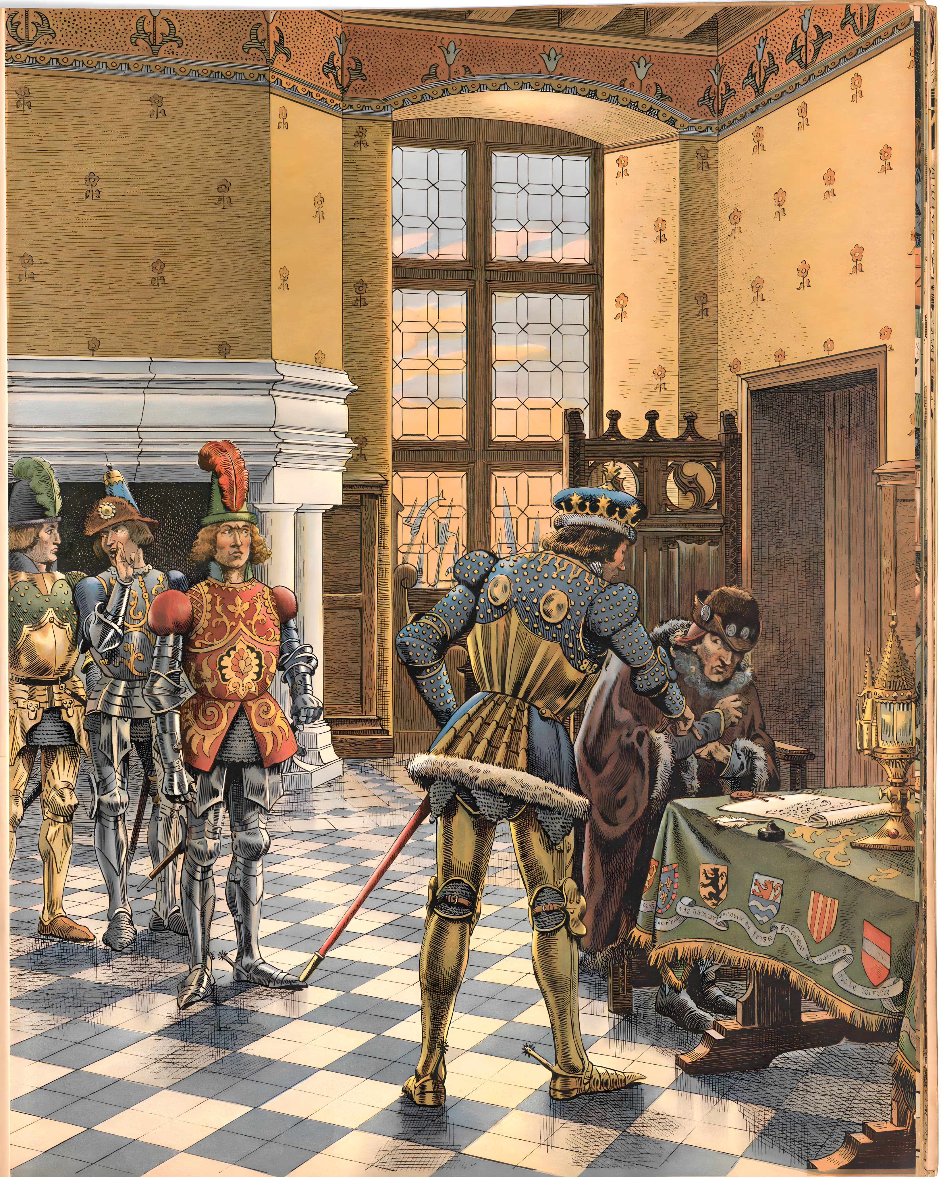 Le traité de Péronne vu par Job et Georges Montorgueil dans Louis XI, Paris, Combet, 1905.